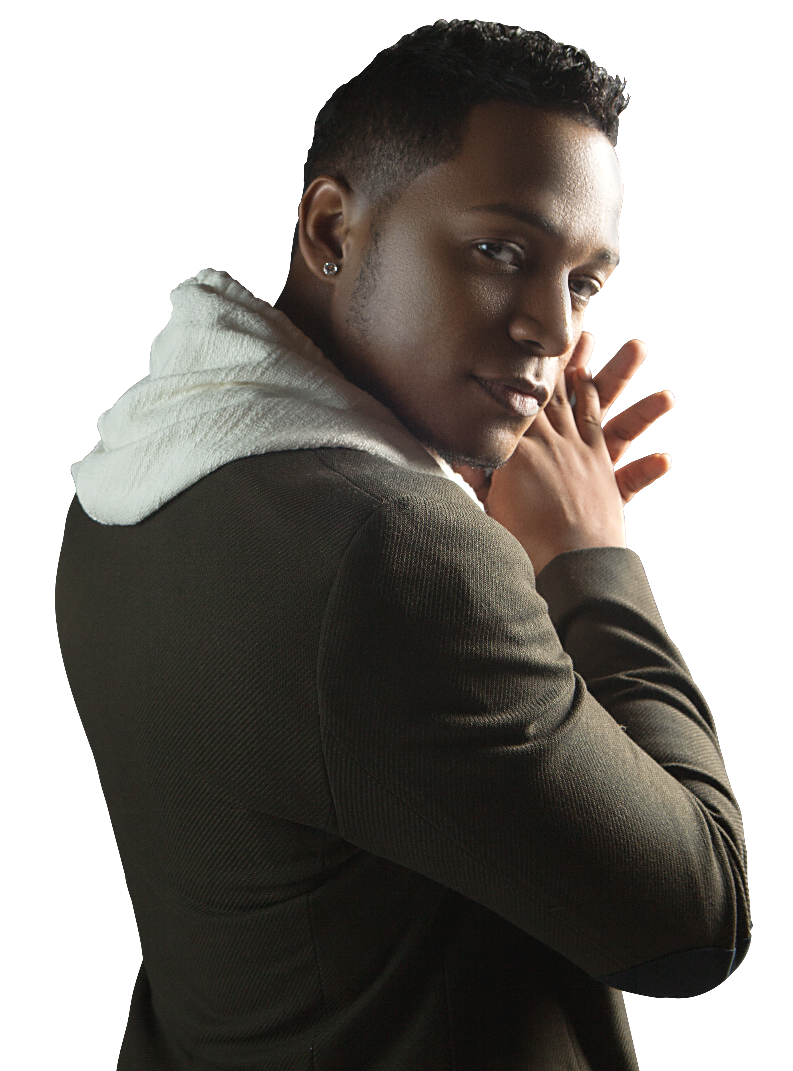 Eddy Lover